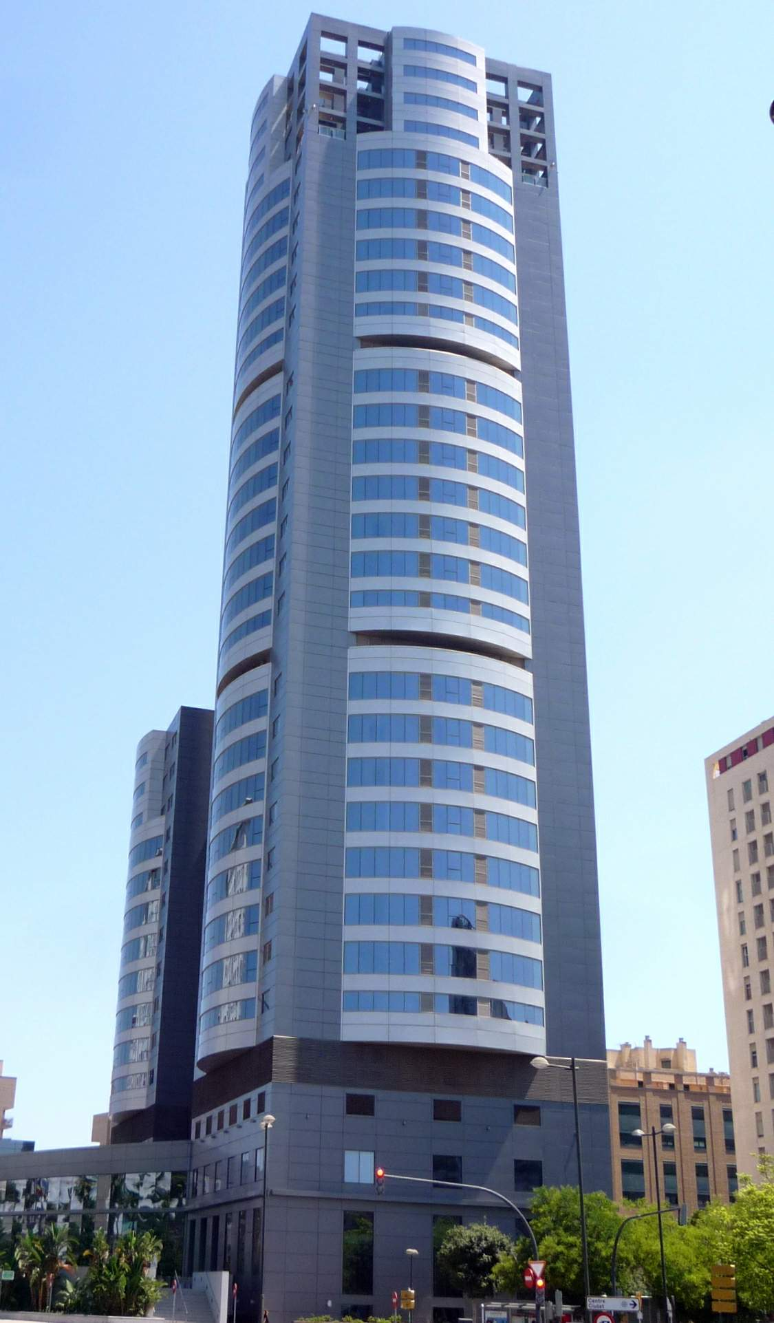 Valencia - Hotel Meliá Valencia (Torre Hilton)